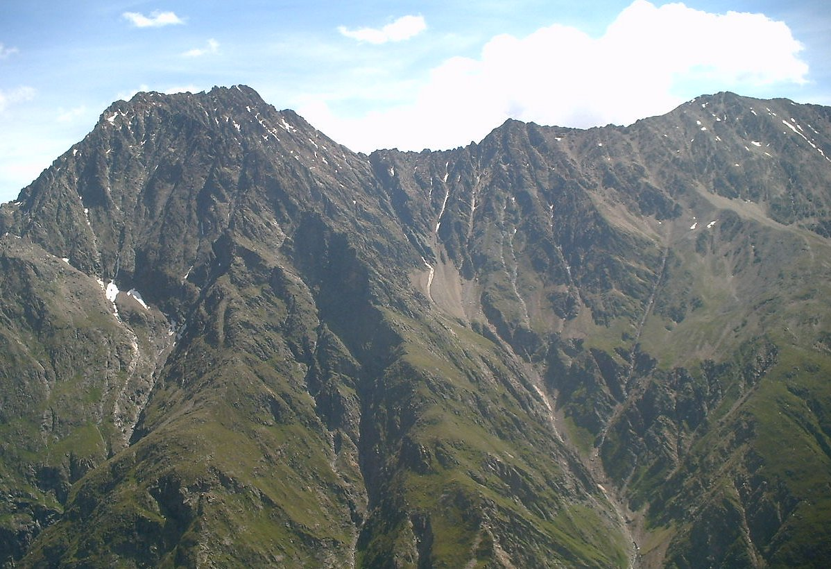 Puitkogel-Sonnenkogel-Wassertalkogel von Westen